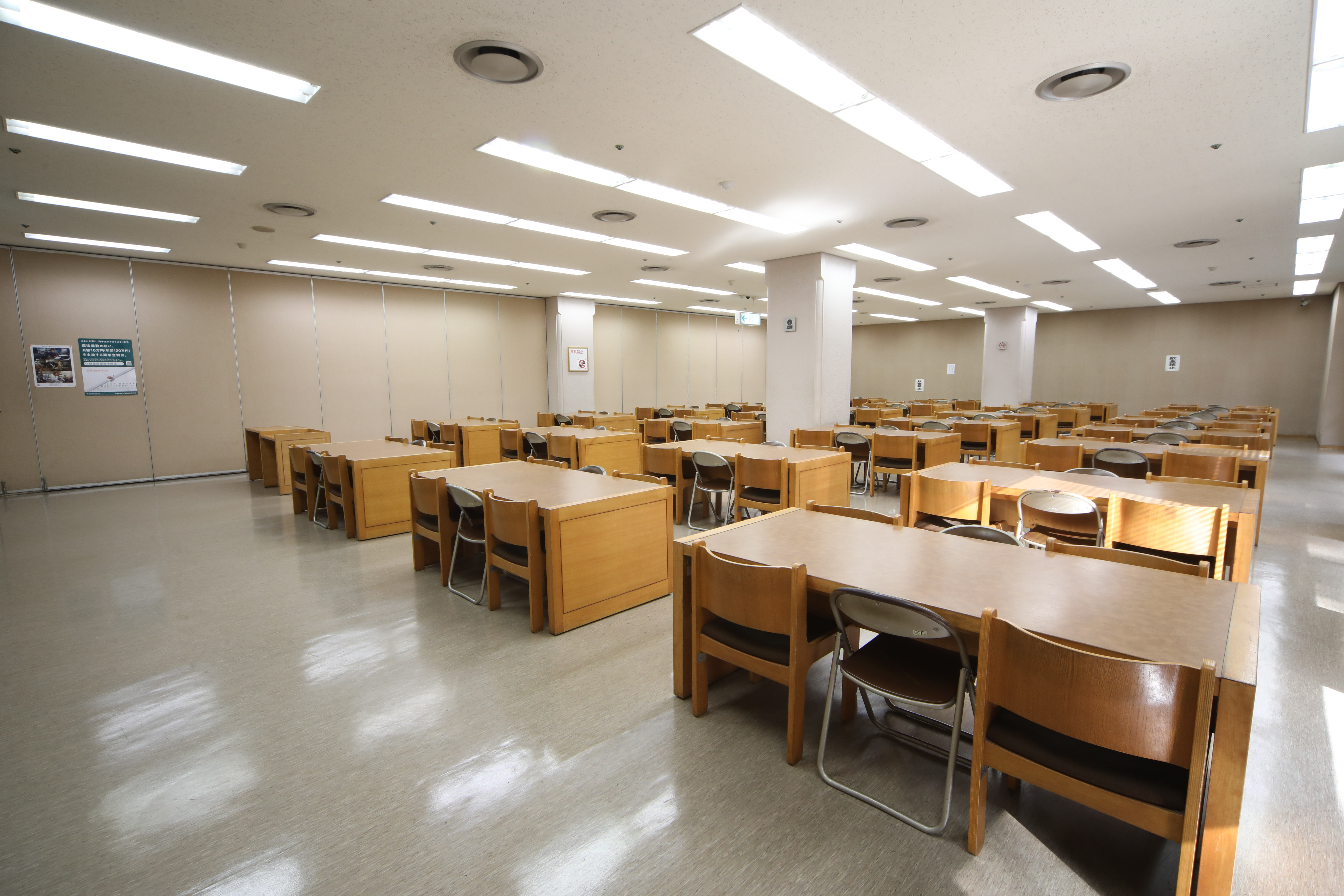 地下１階に２室ある読書室。2018年4月1日より公益財団法人服部国際奨学財団が命名権を取得し、「学習室 supported by 服部国際奨学財団」として運用している。